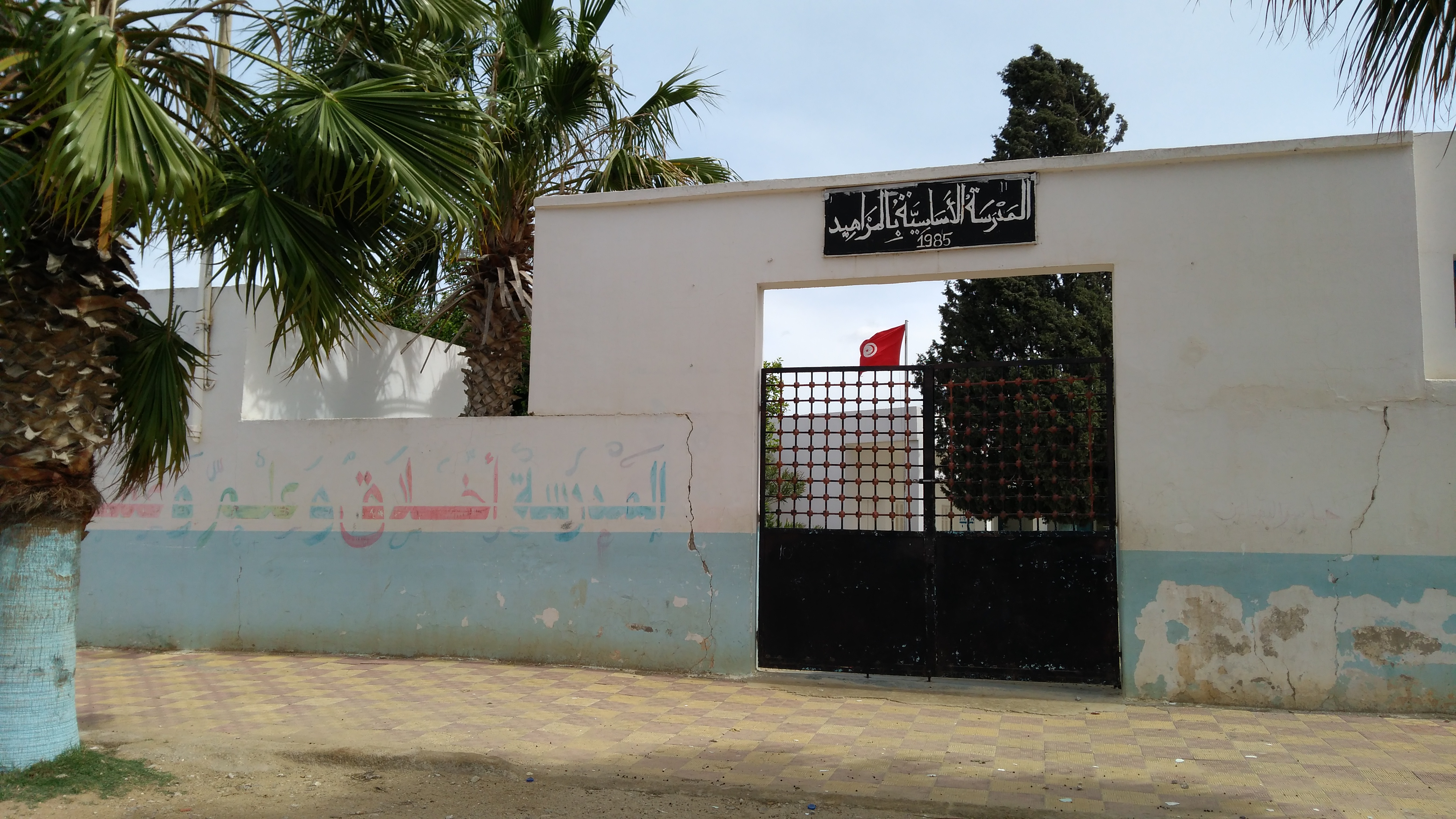 École primaire sur la route principale de la ville de Chrahil, vers la sortie de la ville en allant à Moknine et Monastir.